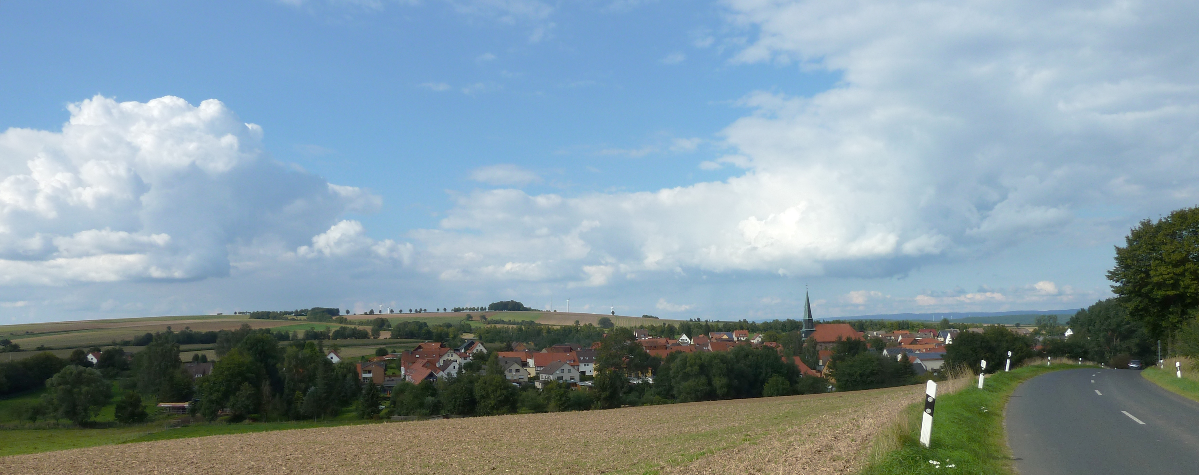 Blick von Süden über Wollbrandshausen auf den Höherberg